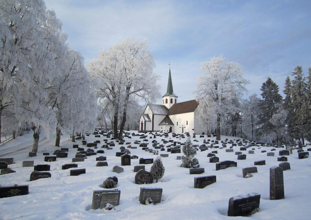 Lunner kirkegård